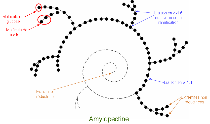 amylopectine, l'une des formes de l'amidon